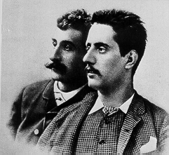 foto ca 1885 da [1]